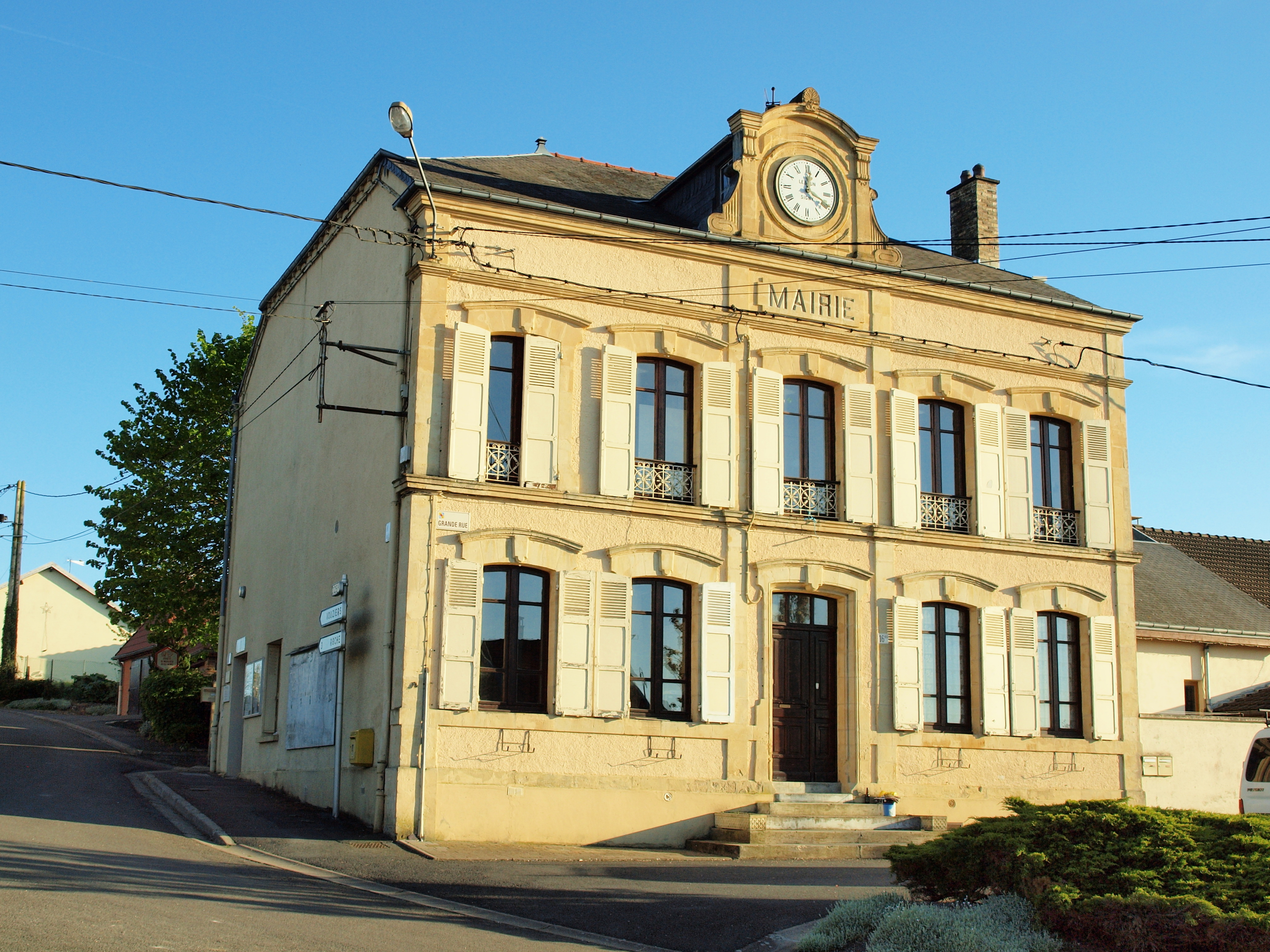 Rilly-sur-Aisne (Ardennes, France)